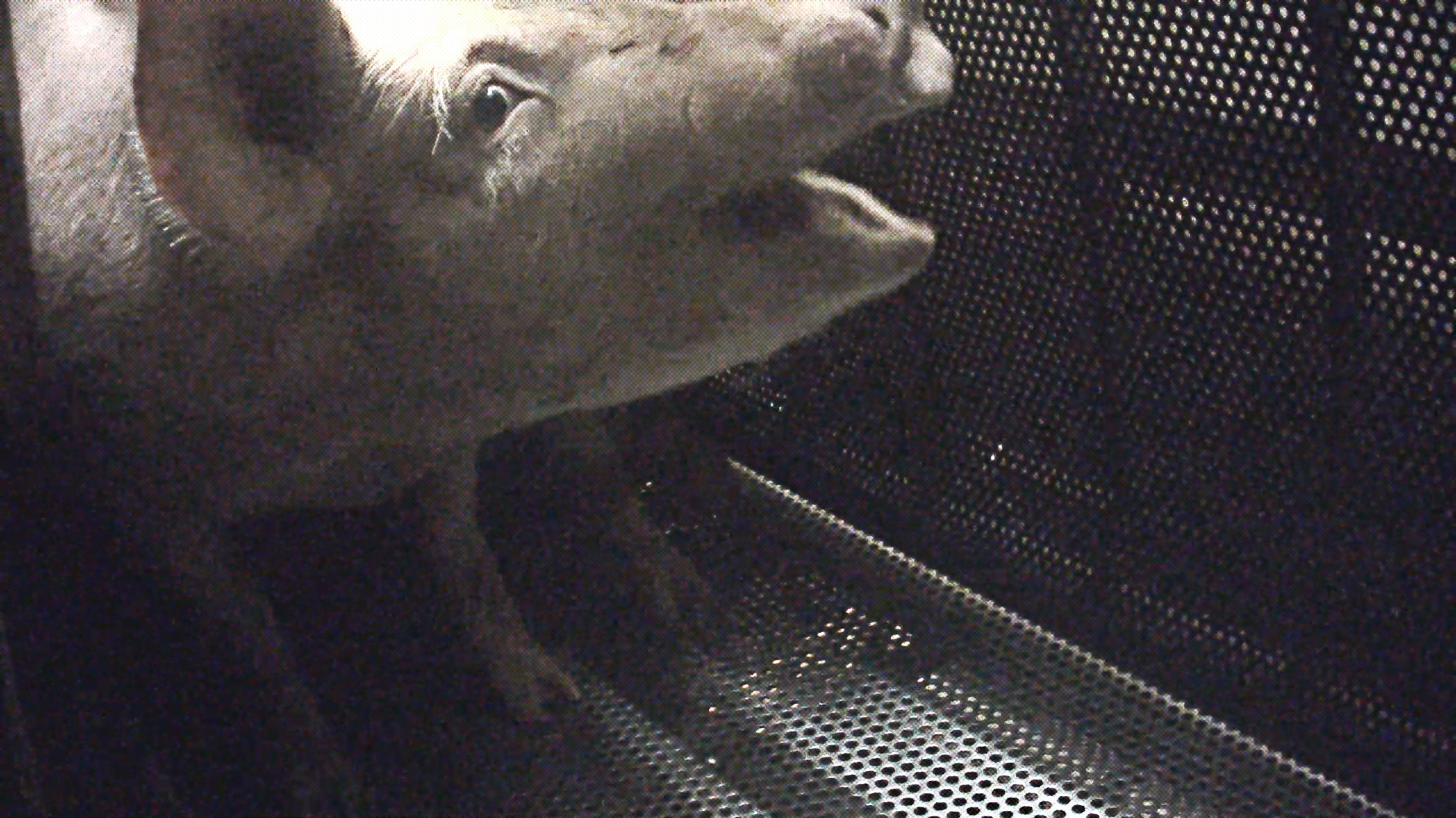 Gazage des cochons au CO2 à l'abattoir de Houdan, en 2017, tel que le documente l'association L214.